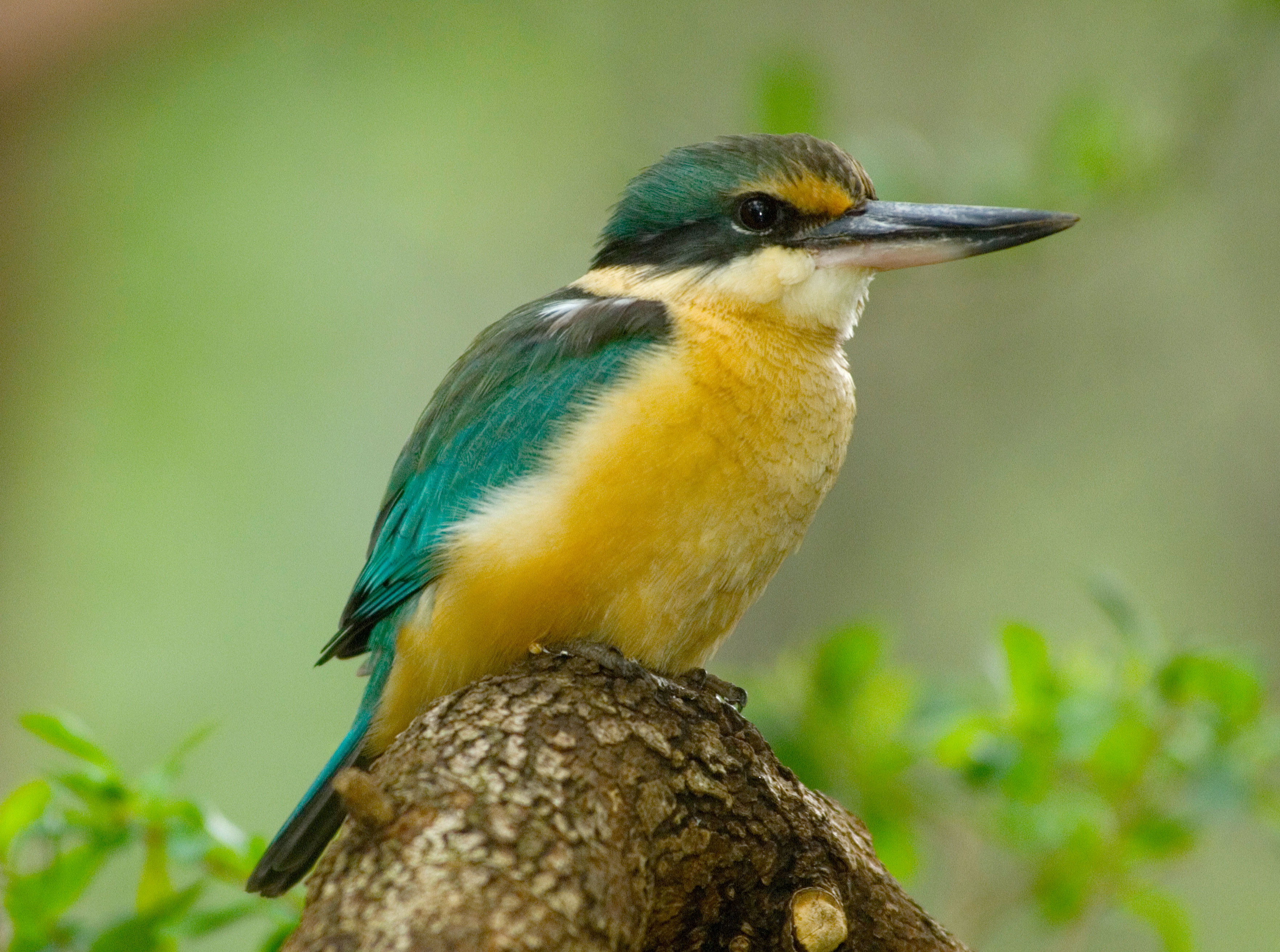 Brisbane Koala Bushlands